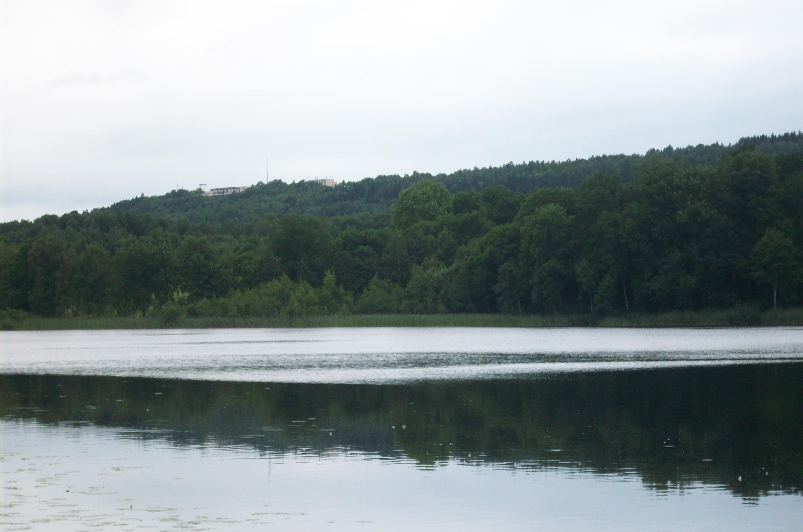 Karstorpasjön i Skövde